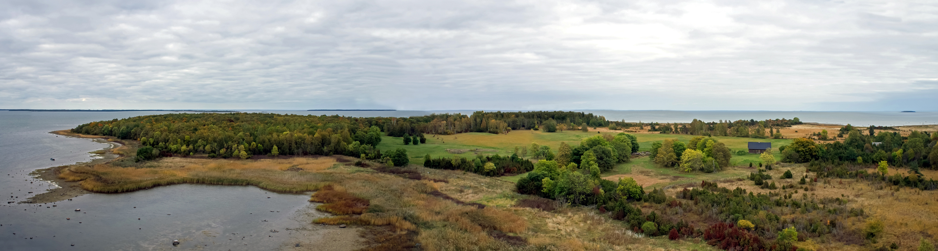 Hanikatsi laiu panoraam